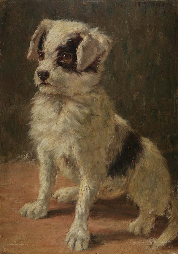 Hundeporträt, Öl auf Karton, 25 x 18 cm; signiert